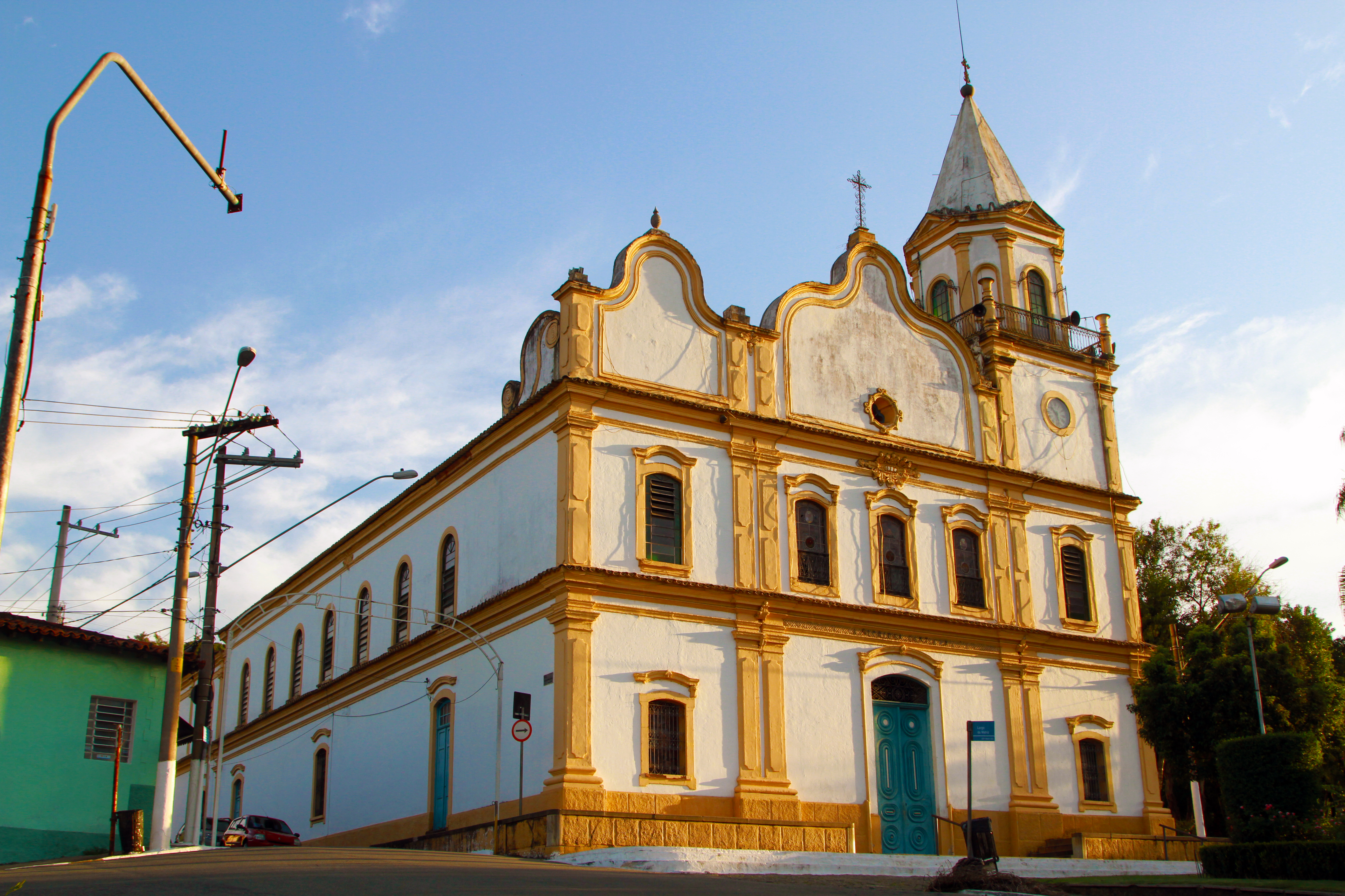 Centro Histórico